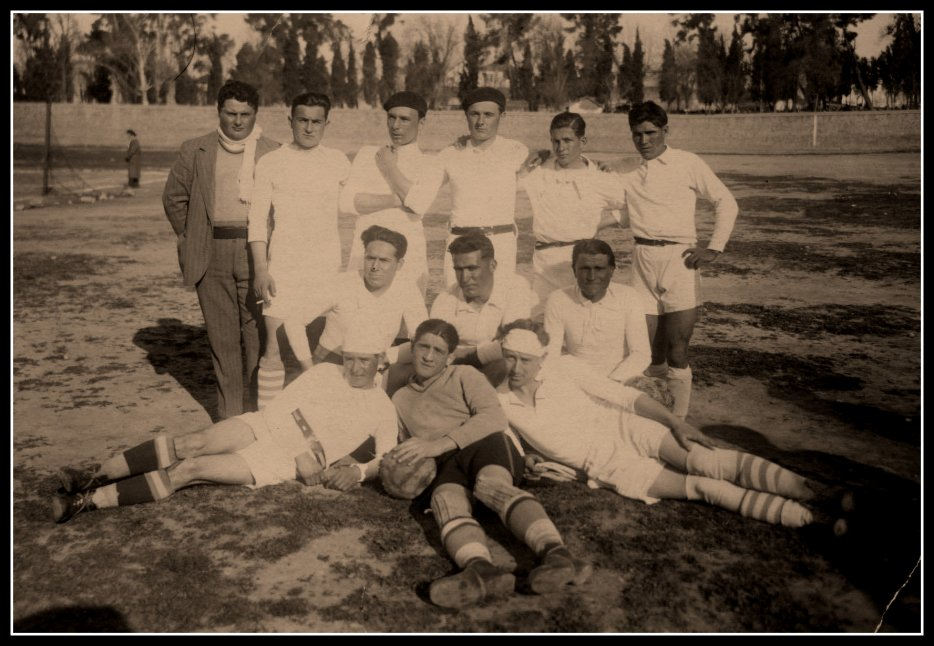 la jeunesse sportive de la commune de Ben Badis (Sidi Bel Abbès)